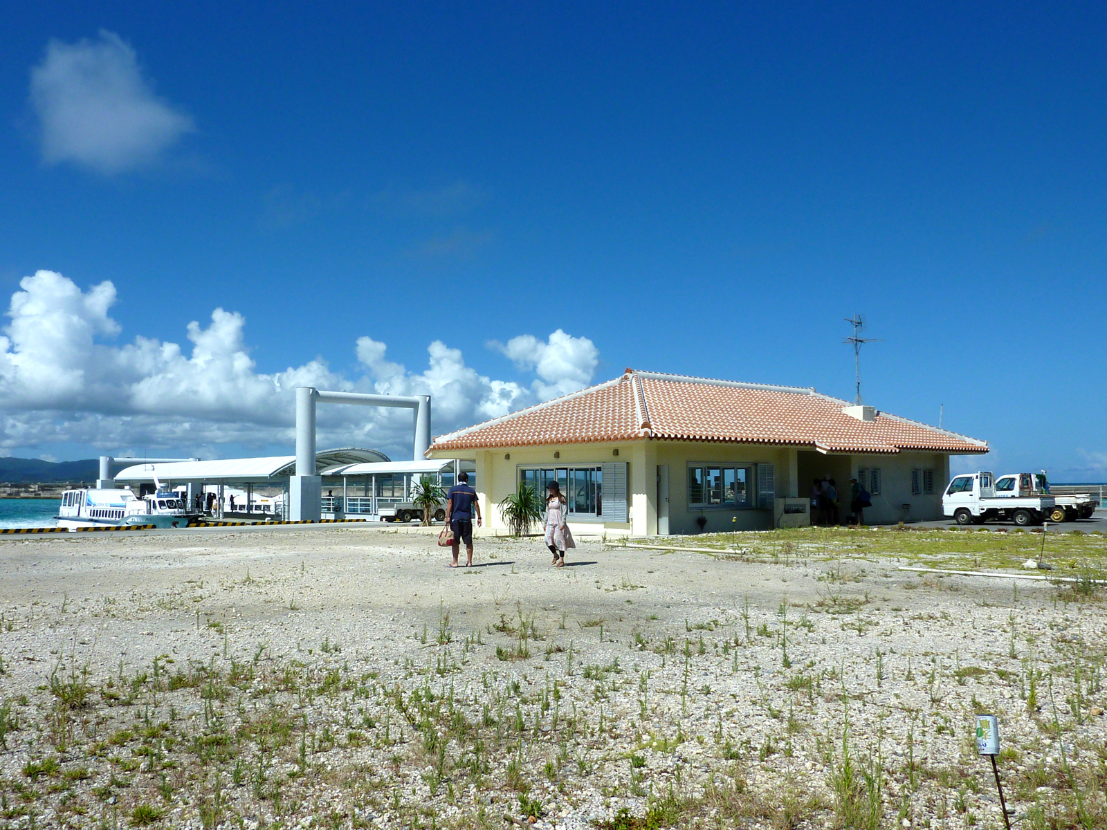 鳩間港ターミナル（沖縄県八重山郡竹富町鳩間島）